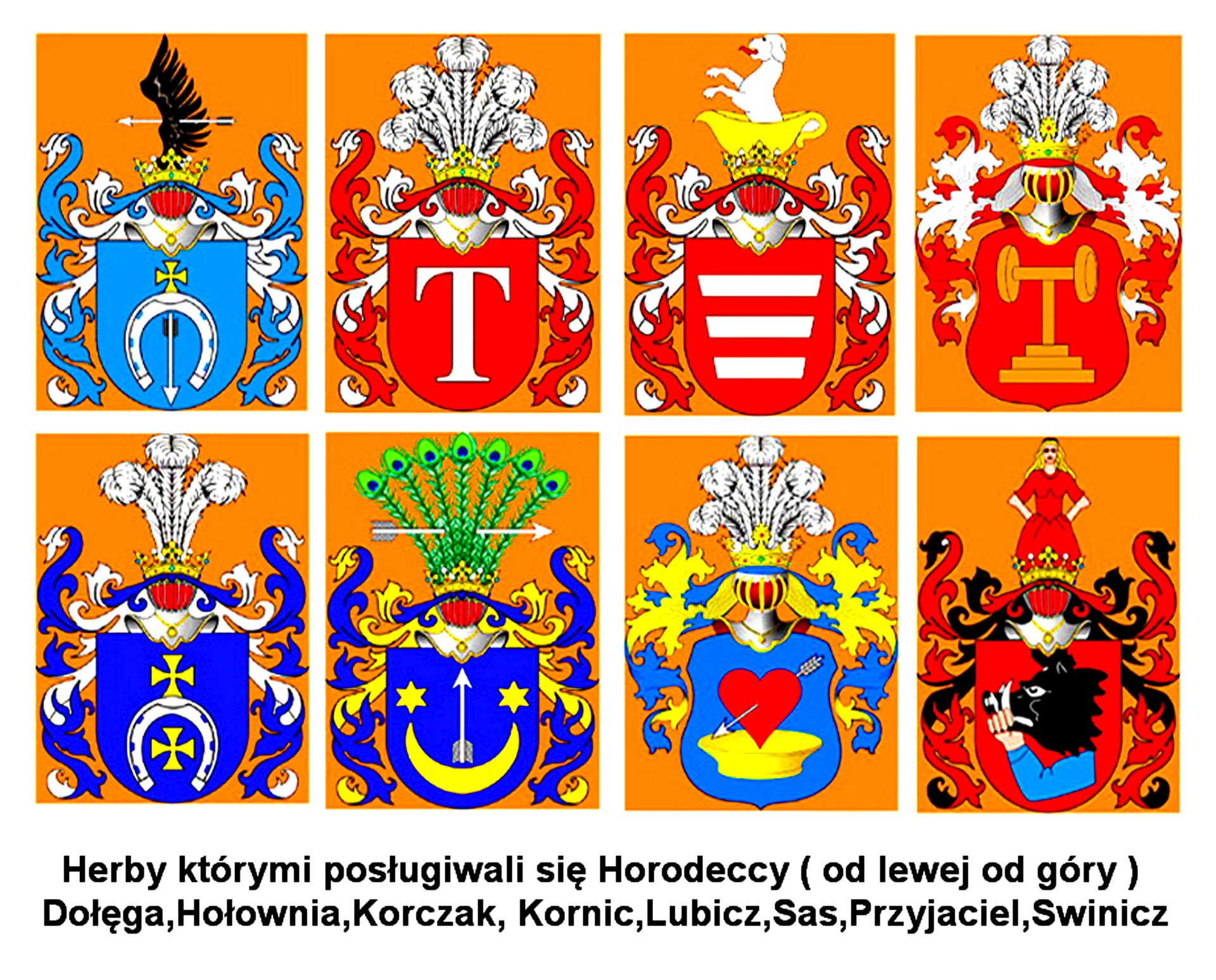 Herby którymi posługiwali się Horodeccy ( od lewej od góry ): Dołęga,Hołownia,Korczak,Kornic,Lubicz,Sas,Swinicz. Praca własna.27.04.2019